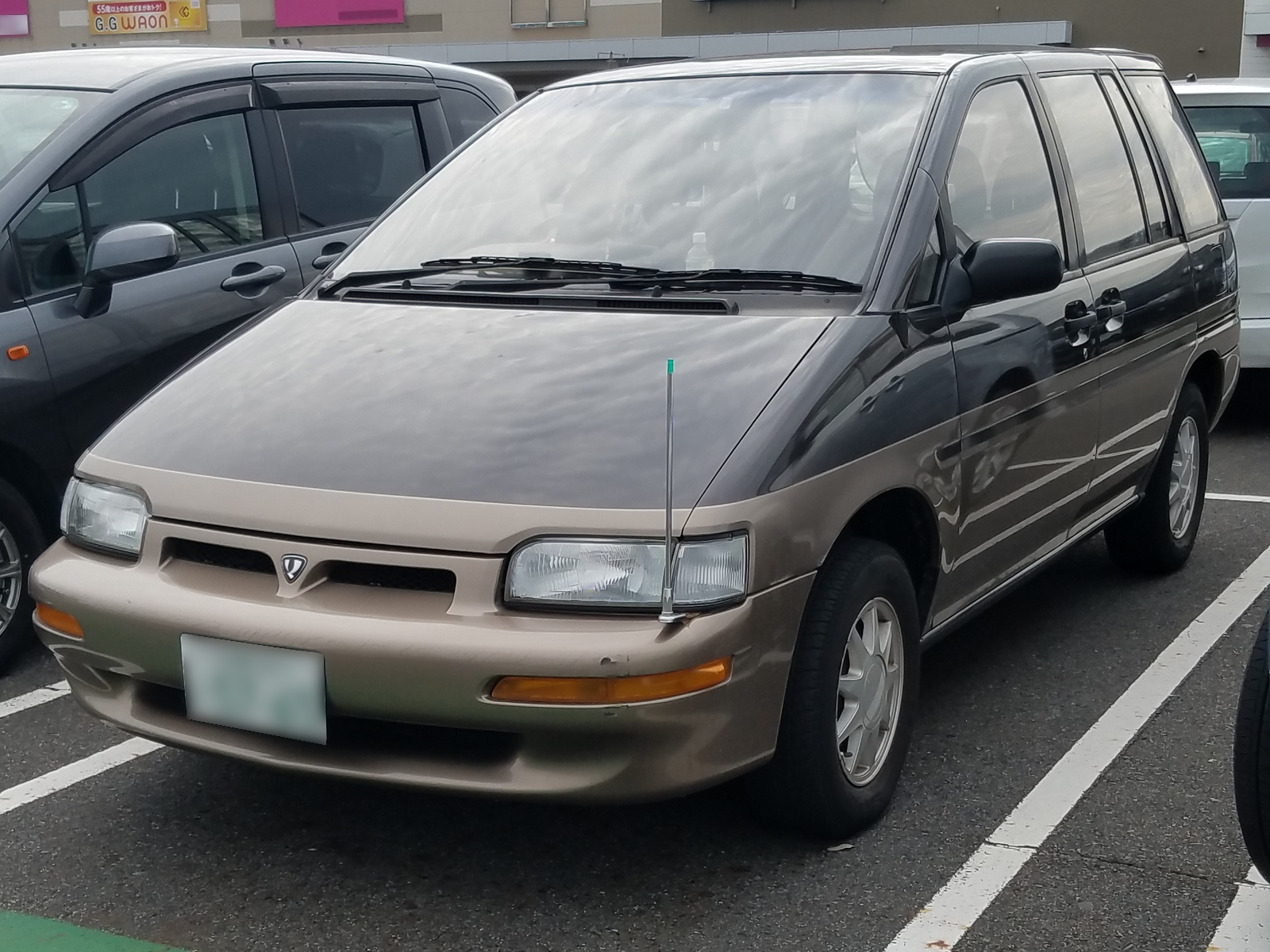 プレーリー 240G-7アテーサ